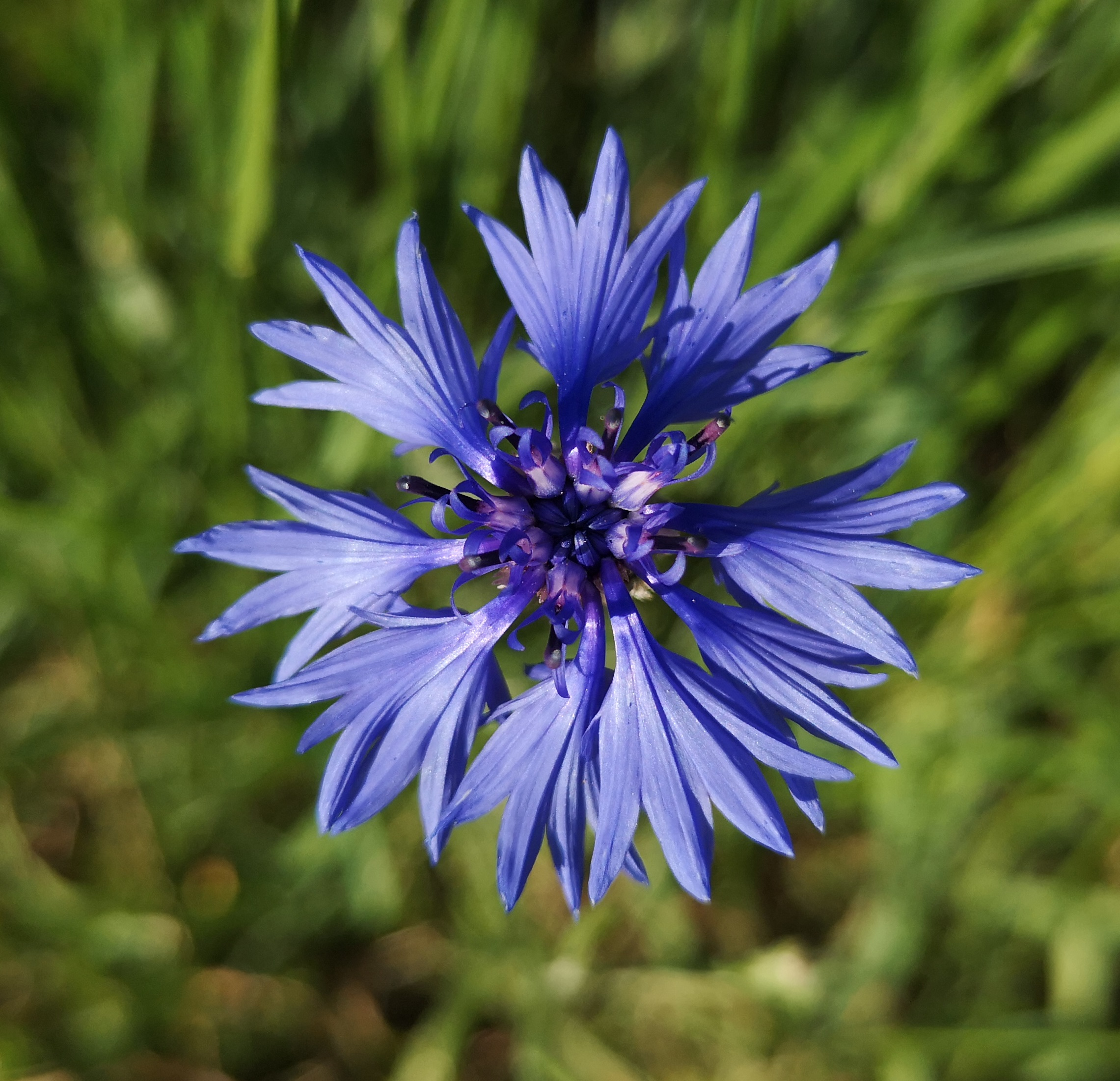 Bleuet_Barbeau_Centaurea cyanus